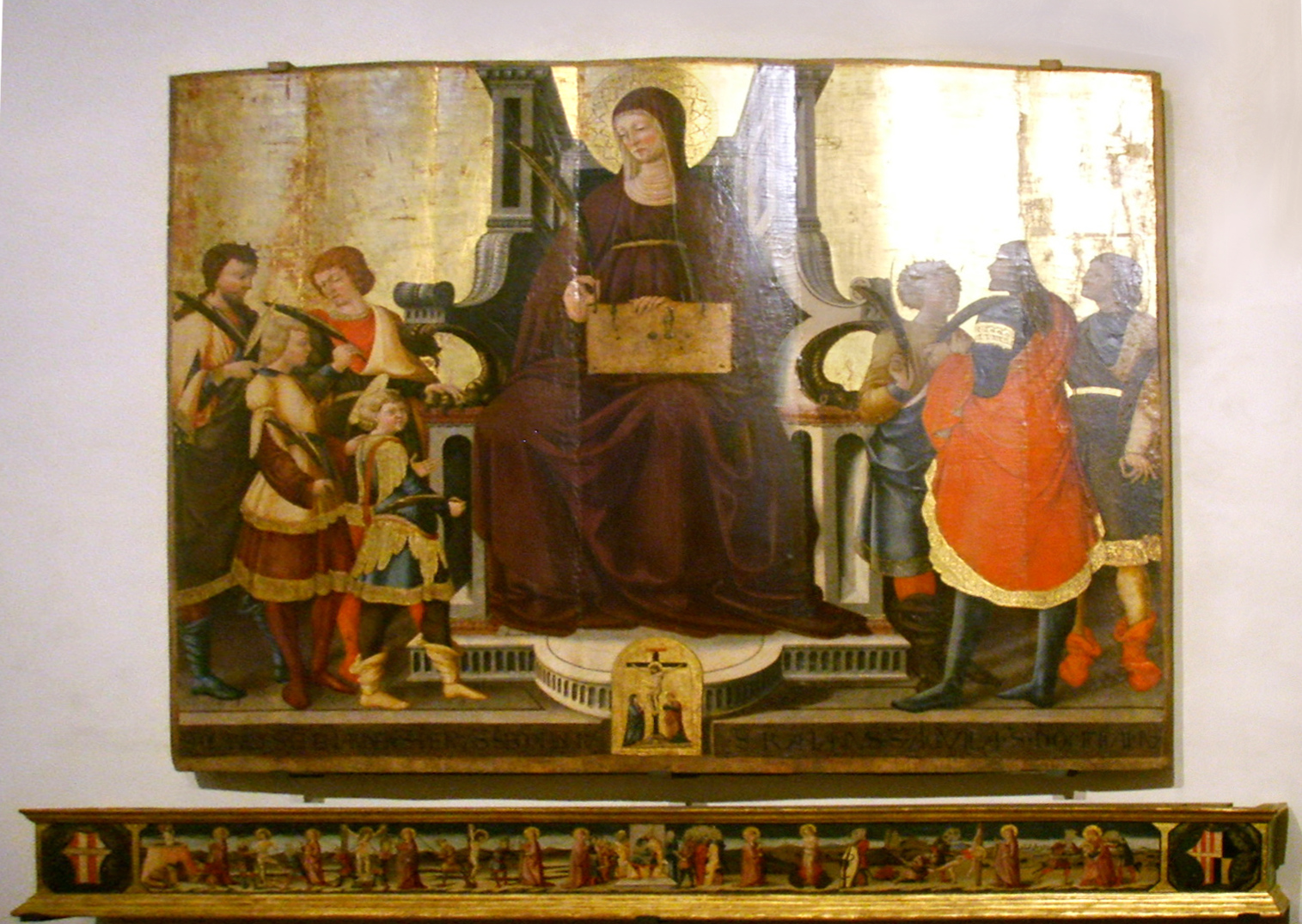 Santa_Felicita, Neri_di_Bicci,_Santa_Felicita_e_i_suoi_sette_figli,_con_predella_(1464) church in Florence